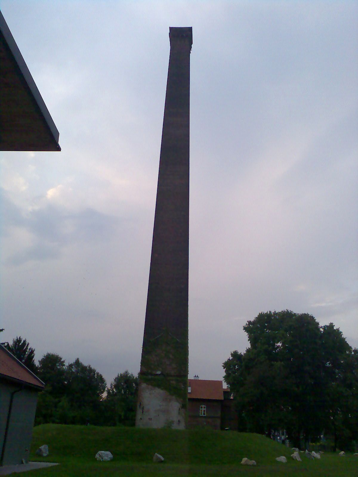 Schornstein der Grazer Seifenfabrik